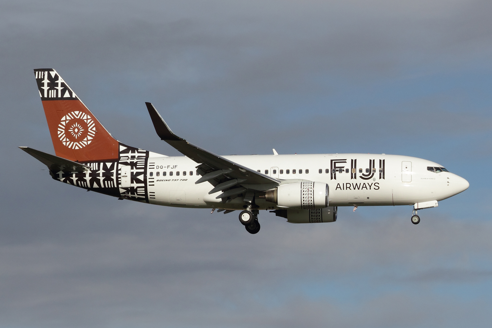 DQ-FJF Boeing 737-7X2 (28878), Fiji Airways, 10 June 2013 - Auckland